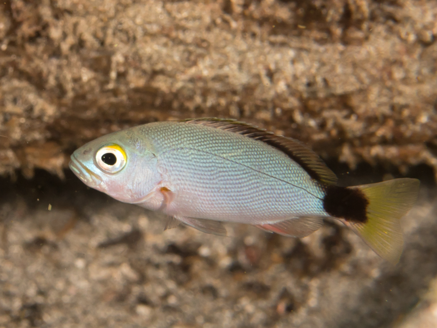 Morotai, Indonesia - Humpback snapper, juvenile (Lutjanus gibbus)